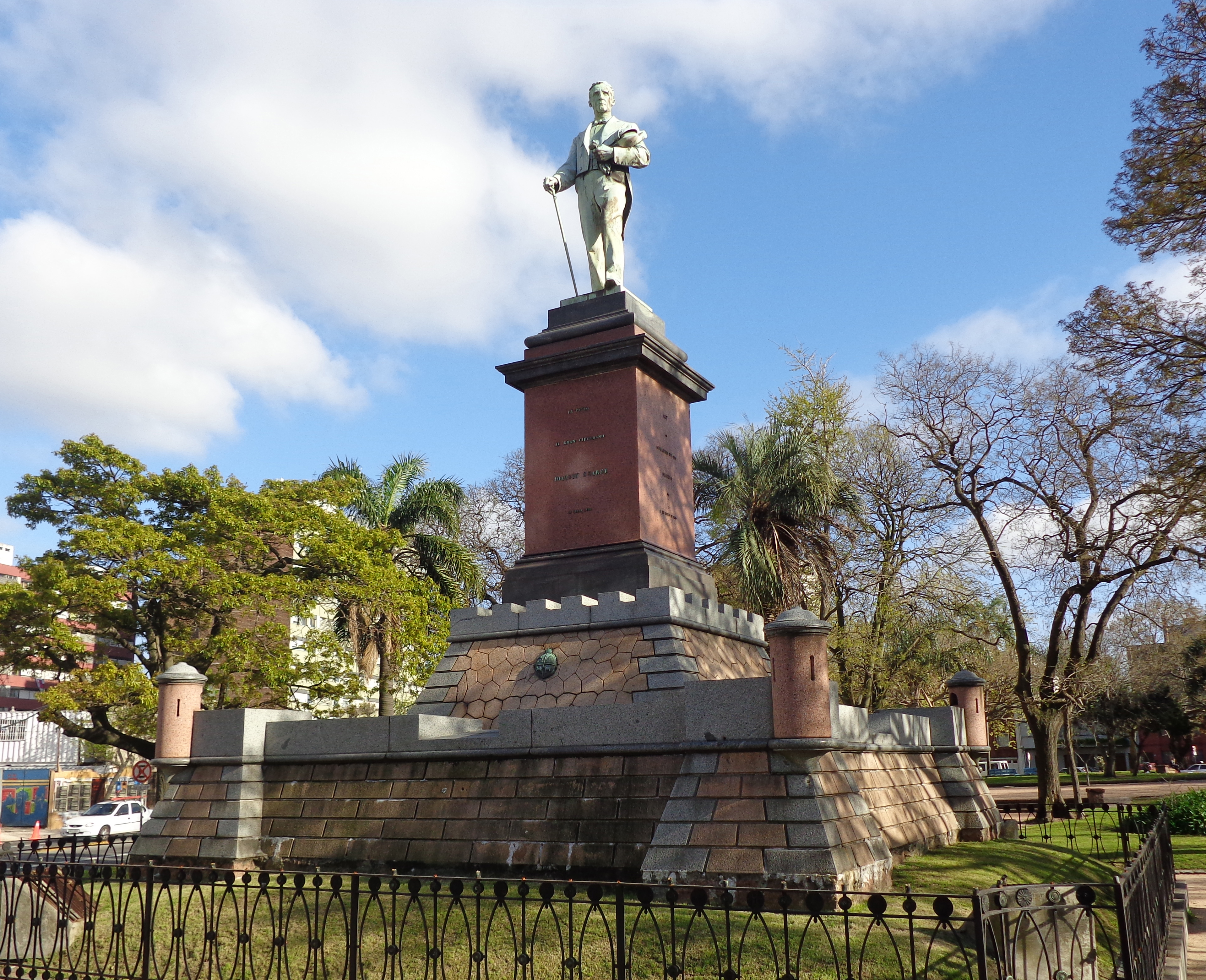 Joaquín Suárez. Ubicada en el departamento de Montevideo